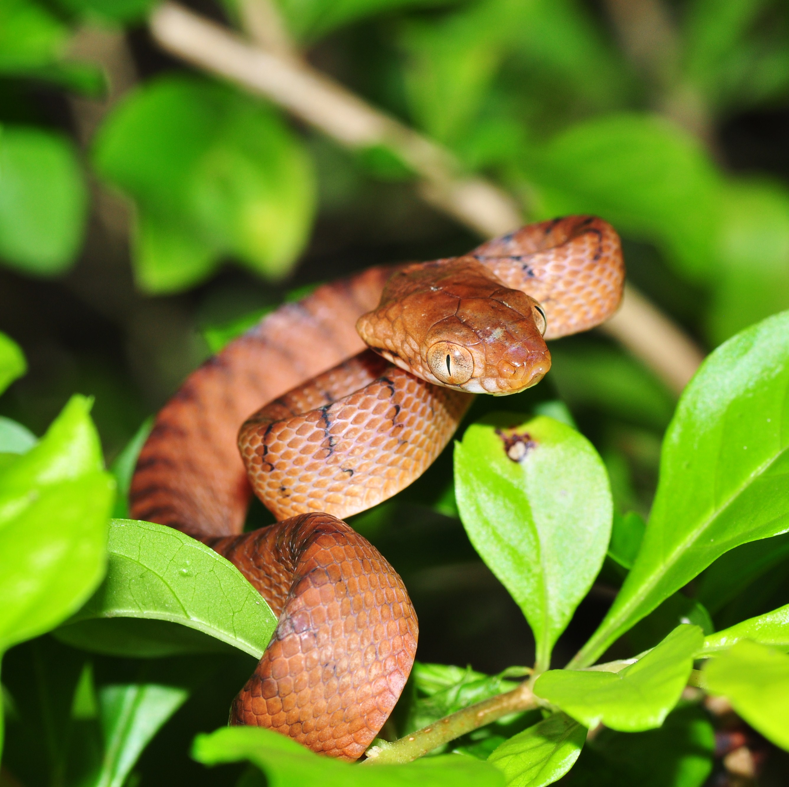 Bogani Nani Wartabone National Park Коричневая бойга